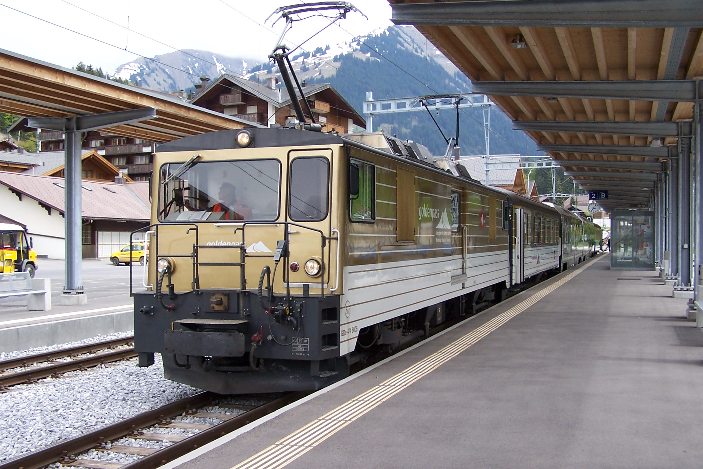 SLM GDe 4/4 6005 in Gstaad